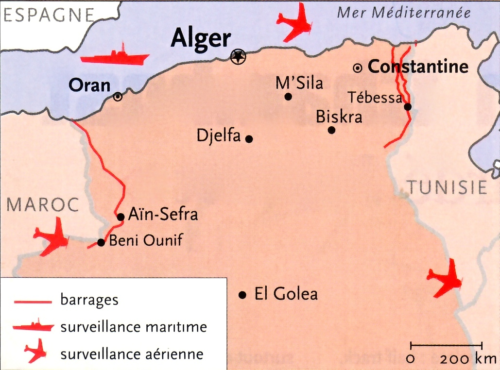 Barrages frontaliers Est-Ouest (guerre d'Algérie)